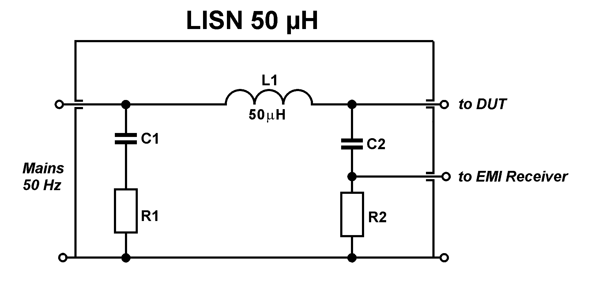 block diagram LISN